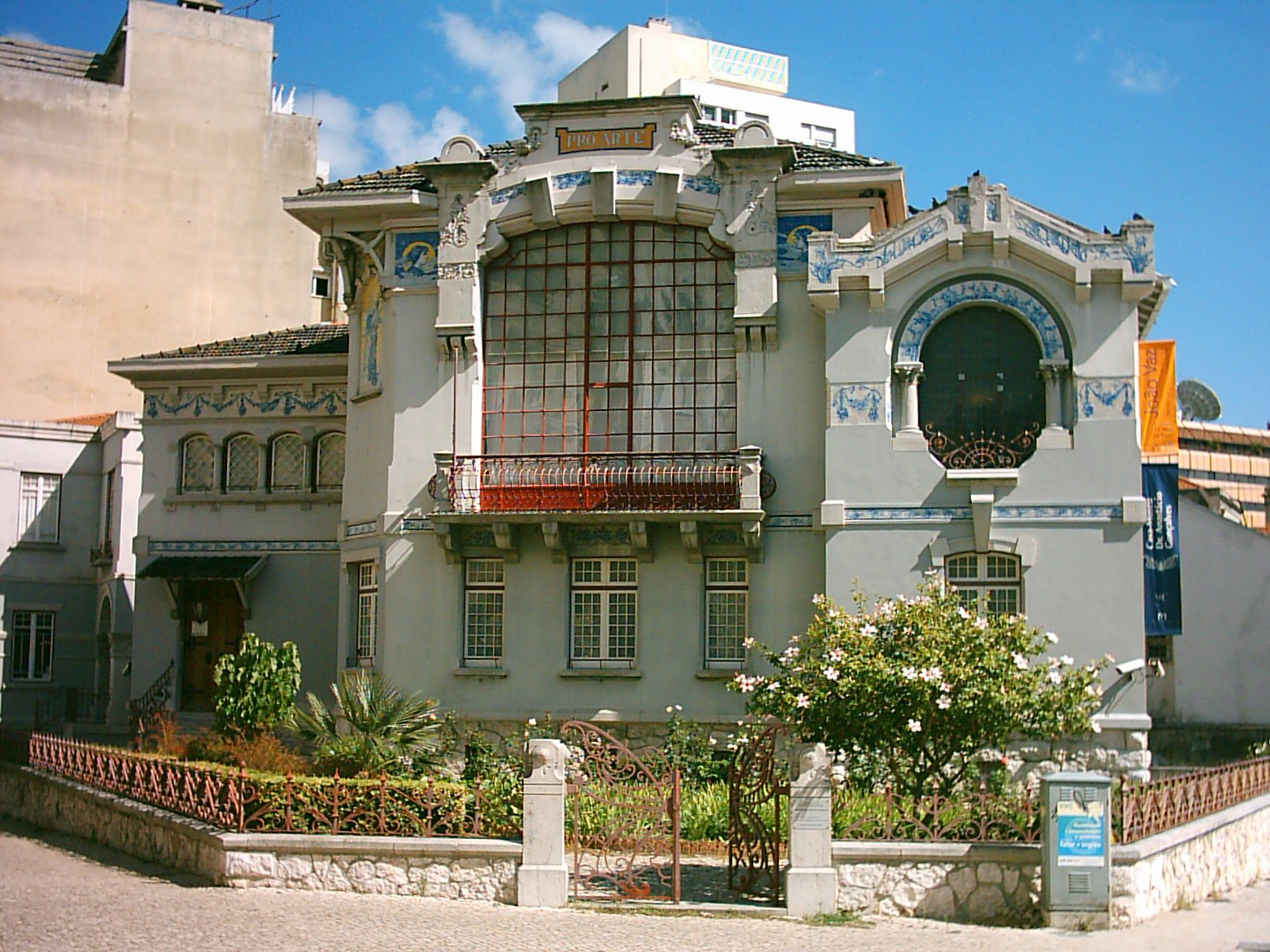 Casa-Museu Dr. Anastácio Gonçalves ou Casa de Malhoa em Lisboa, Portugal